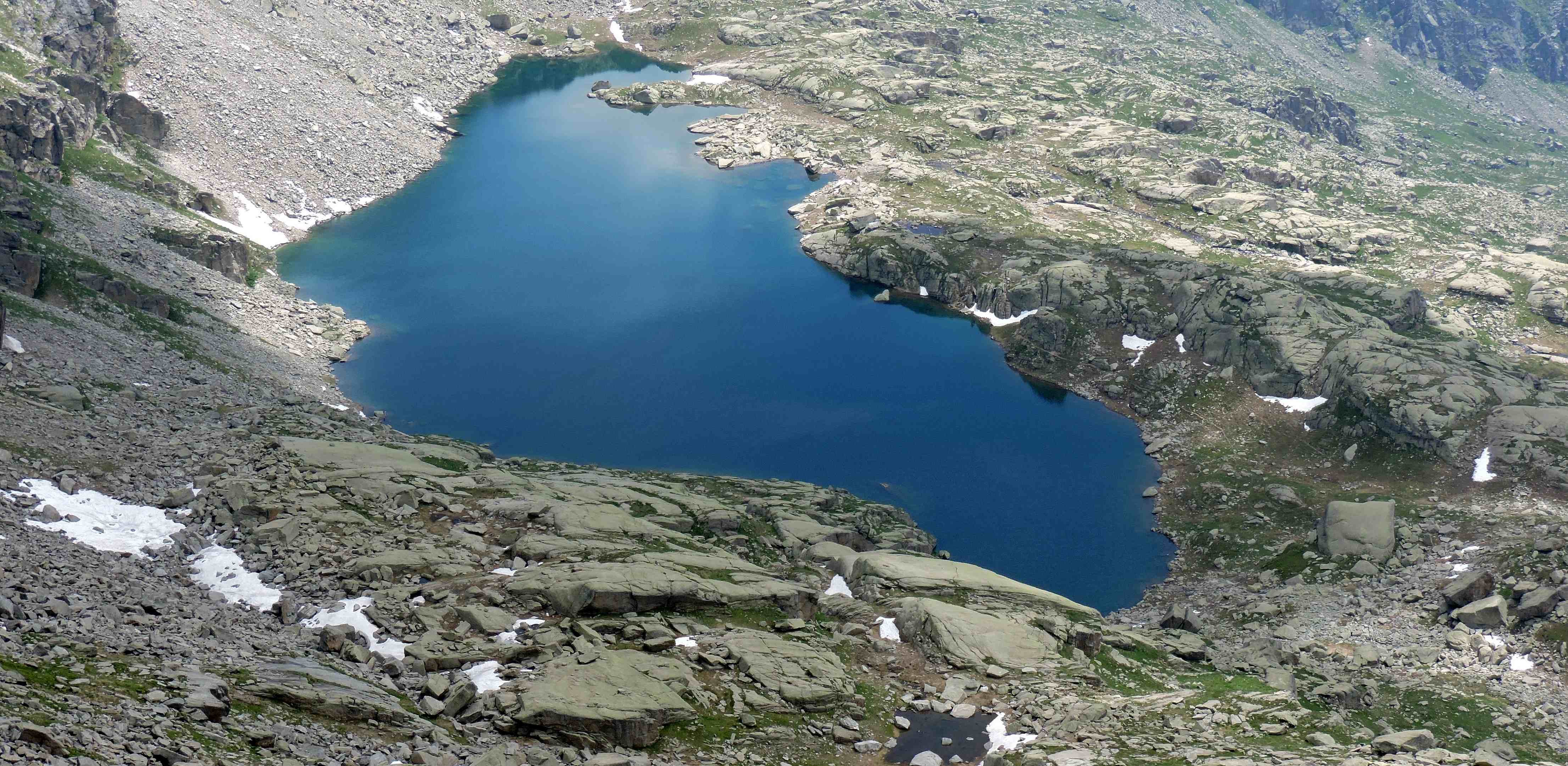 Il lago Grande di Unghiasse (Alpi Graie) visto dal da versante sud del monte Bellagarda